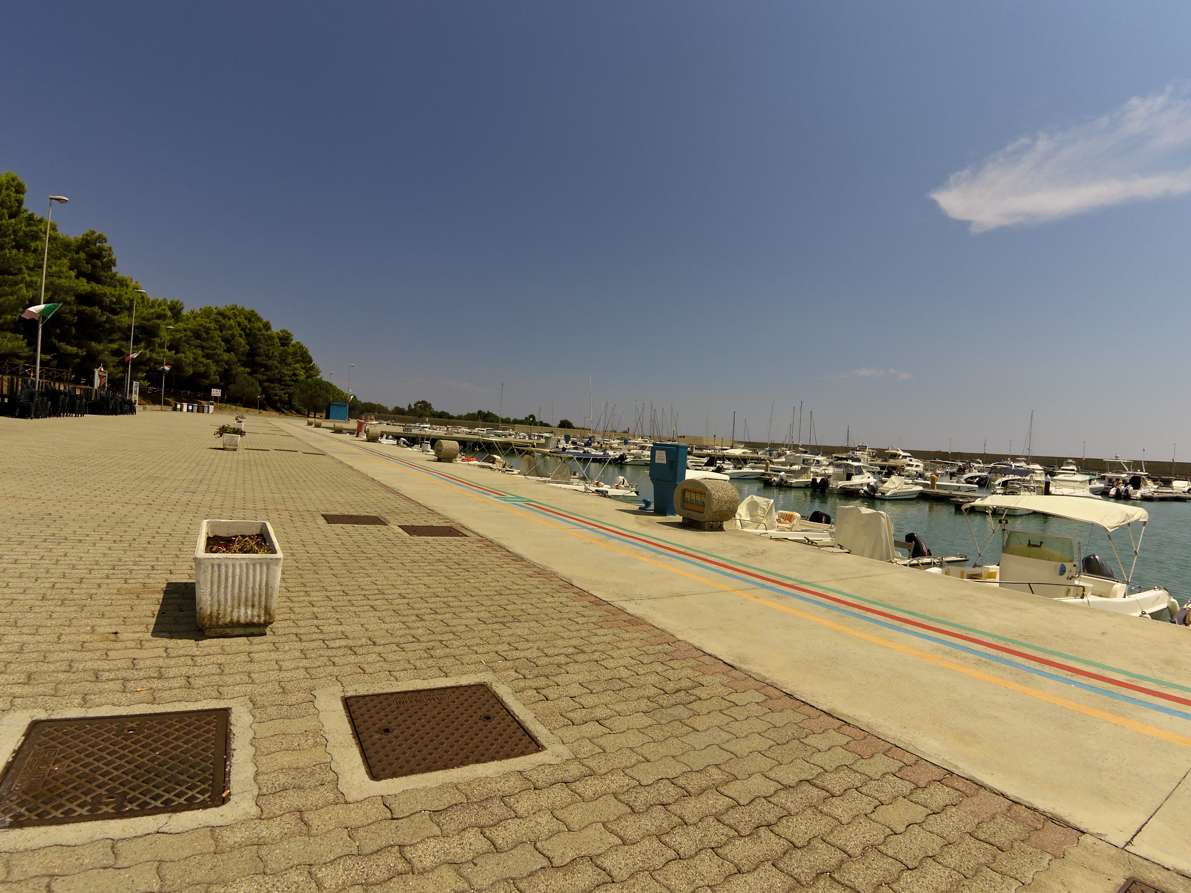 Porto di Roccella Jonica (2018)